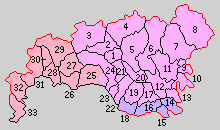 愛知県宝飯郡の町村制時点の町村。